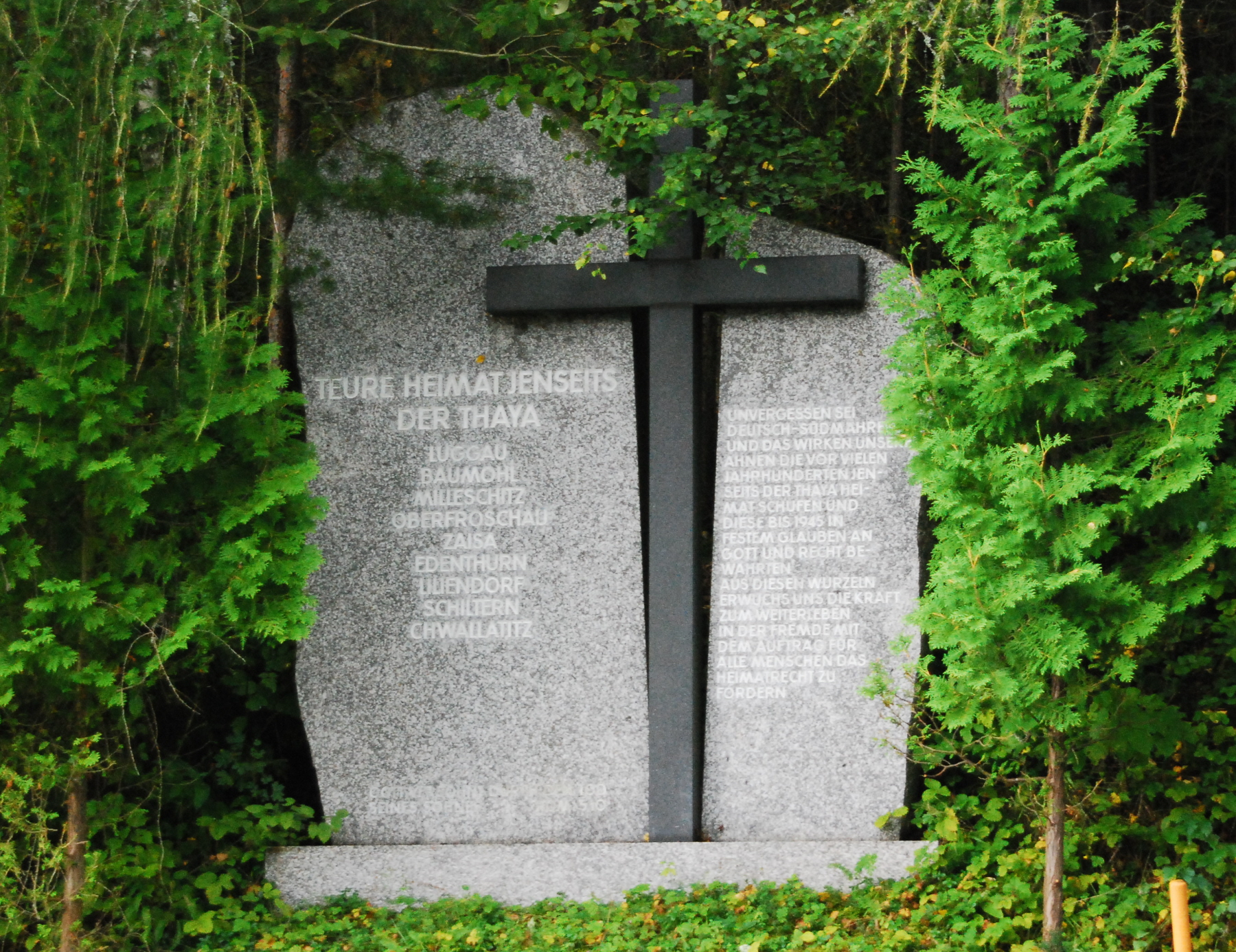 Denkmal für Heimatvertriebene in Hardegg an der Thaya